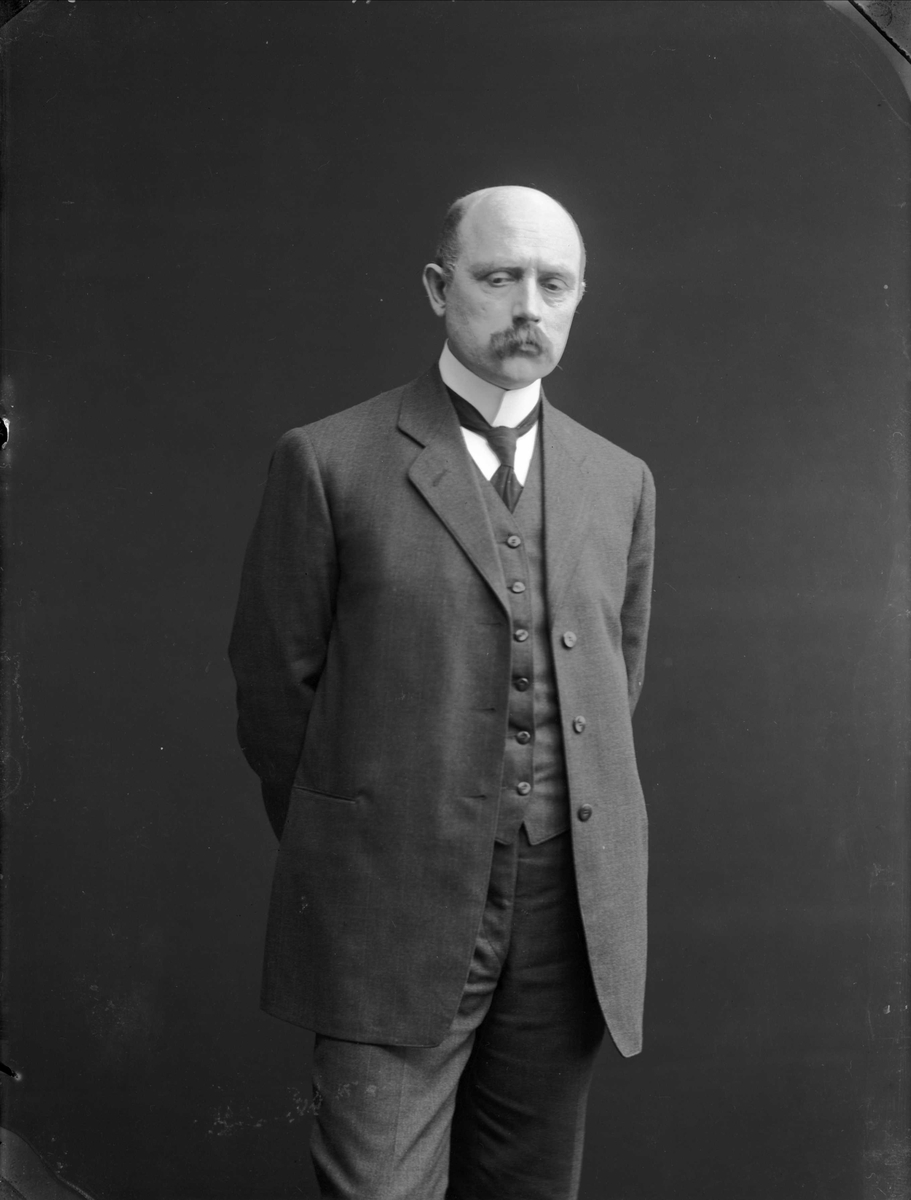 Gunnar Karelius Utsond (født 1864 i Kviteseid, død 1950) var en norsk billedhugger.